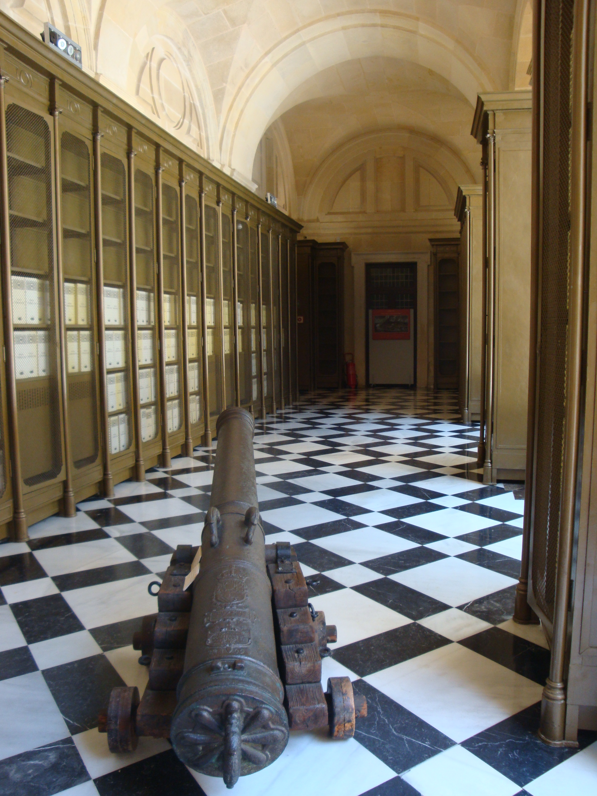 Pasillo en el Archivo General de Indias. Sevilla (Andalucía, España)